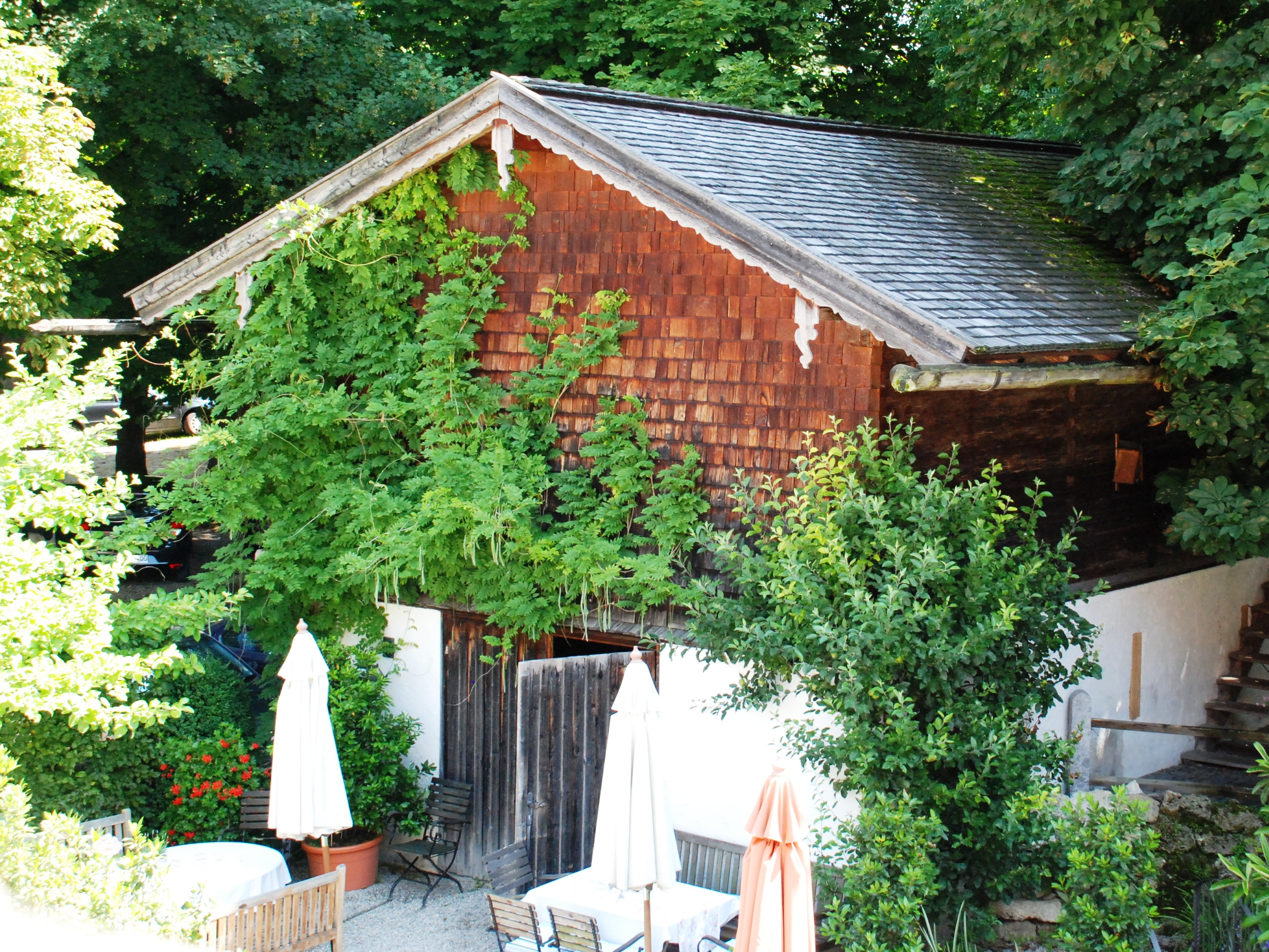 Getreidekasten in der Zornedinger Straße 1 in Aying, Landkreis München, Bezirk Oberbayern, Bayern. Als Baudenkmal in der Bayerischen Denkmalliste unter Aktennummer D-1-84-137-19 aufgeführt. Laut Denkmalliste im 17./18. Jahrhundert erstmals errichtet, 1979 aus Peiß an den jetzigen Standort versetzt. Foto gemäß den Voraussetzungen zur Panoramafreiheit von öffentlicher Verkehrsfläche aus aufgenommen.